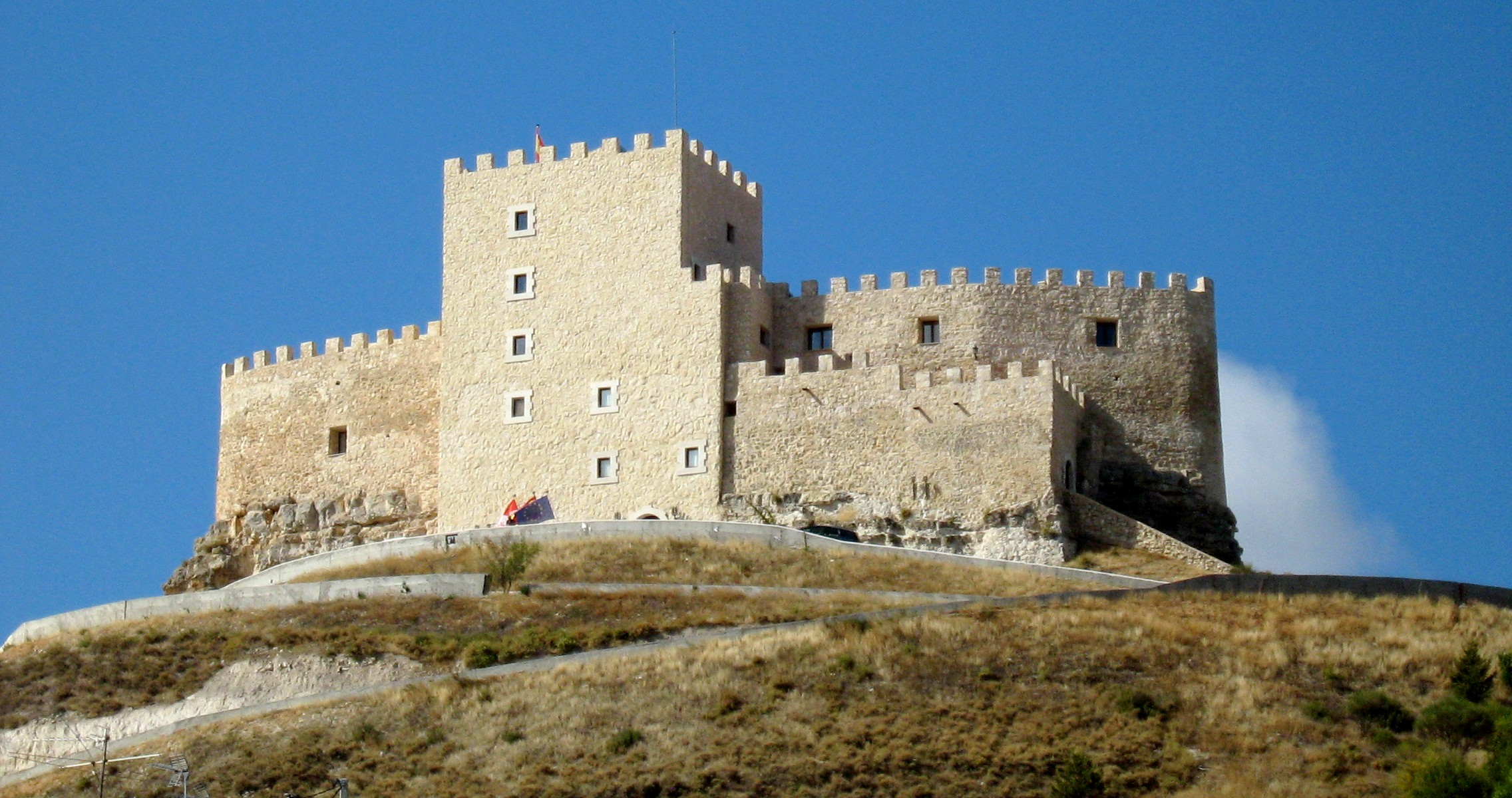 Curiel de Duero. Castillo. Valle del Cuco. Valladolid